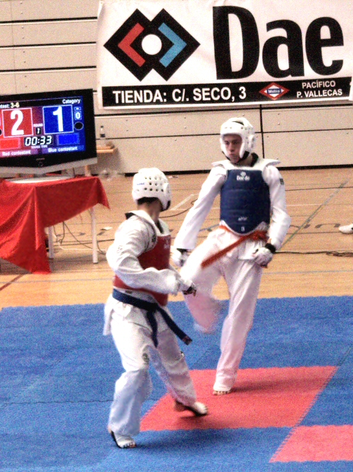 Campeonato absoluto de Promoción de Taekwondo disputado el 2 de Junio de 2007 en el pabellón Europa de Leganés (Madrid). Categoría Welter (superligero) entre cinturón naranja y azul.